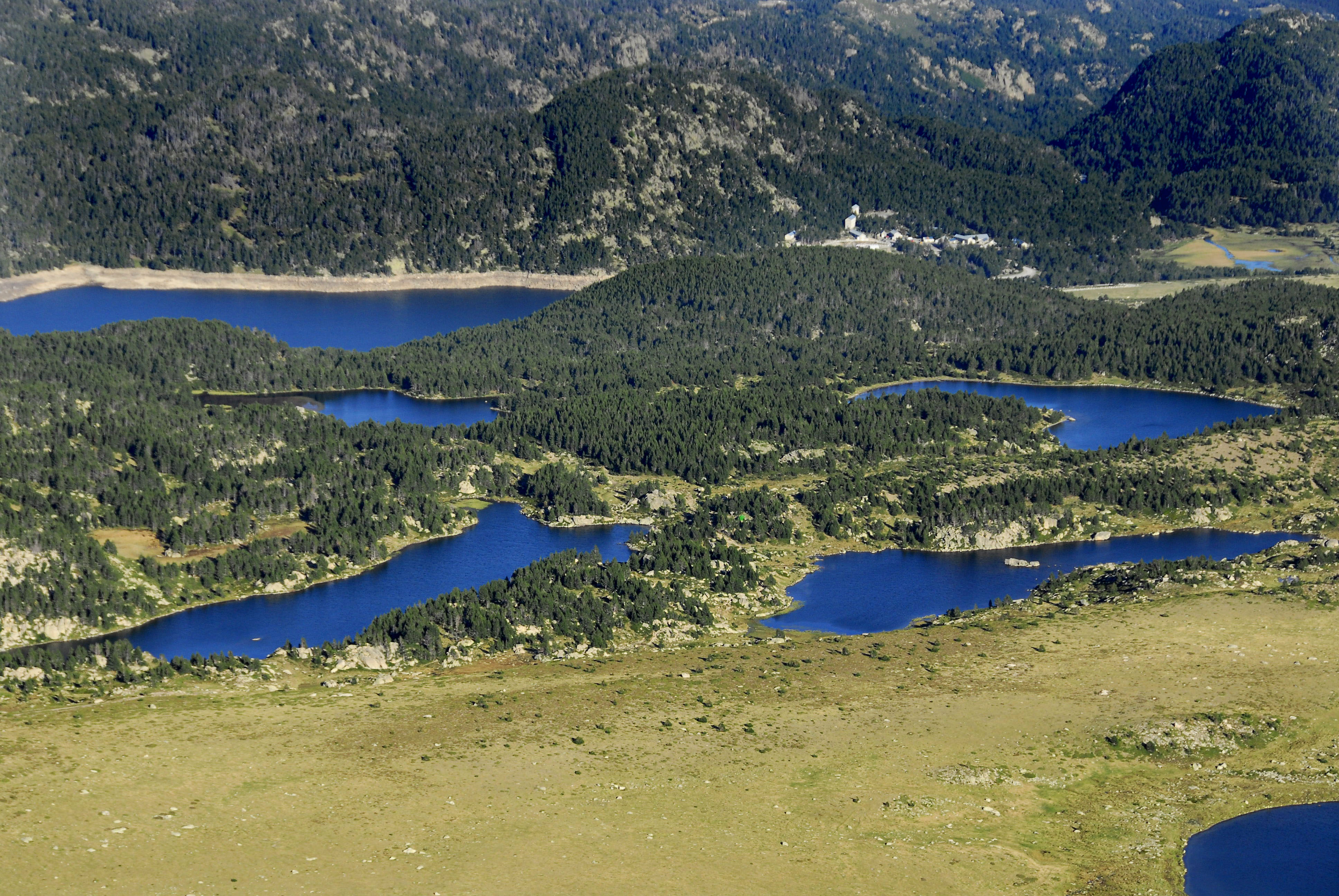 lacs du Carlit